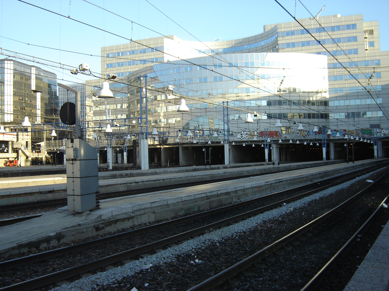 Vue de la gare Montparnasse prise depuis le quai voies 2/3